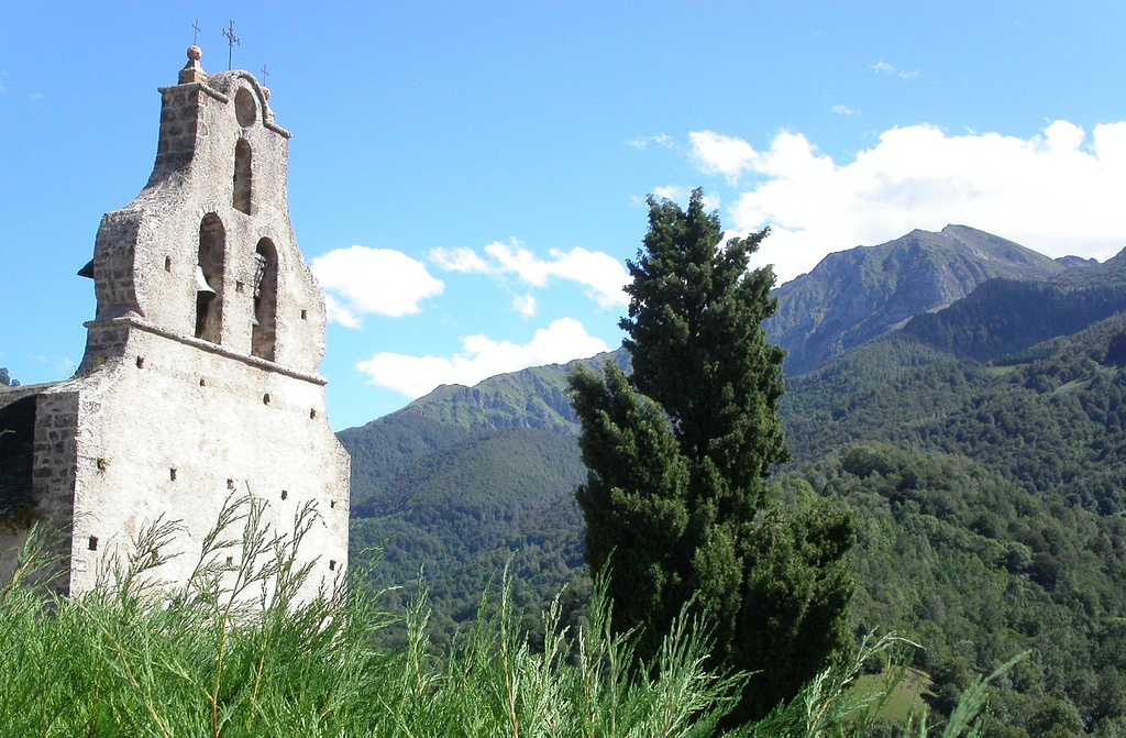 Eglise du 16 ème, 17 ème et 18 ème siècle dédiée à Saint Michel, inscrite aux Monuments Historiques en 1950. Confessionnal, boiseries et retable du 18 ème siècle .